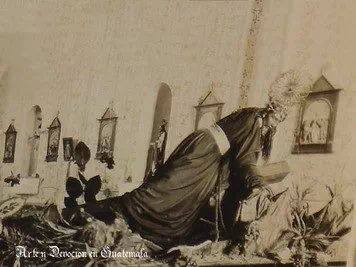 Imagen de Jesús Nazareno de los Milagros, cuando había sido modificado para ser Jesús de la Caída en la década de 1920.